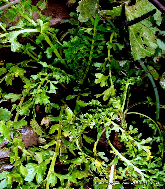 نباتات برّية سورية تؤكل